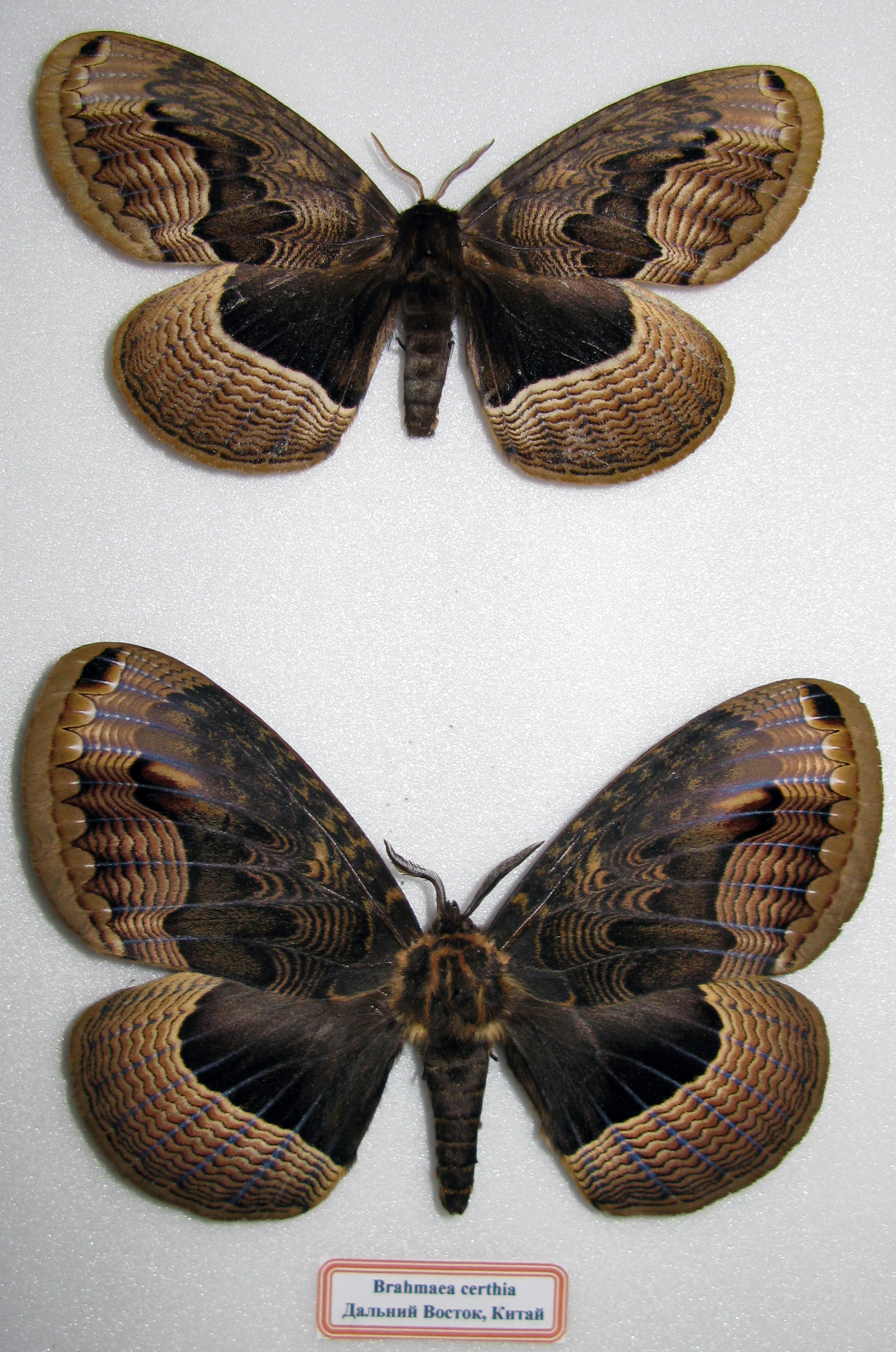 Брамея дальневосточная